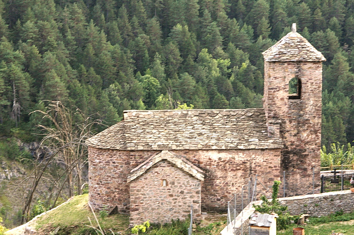 Església de Renanué (la Franja-Osca)